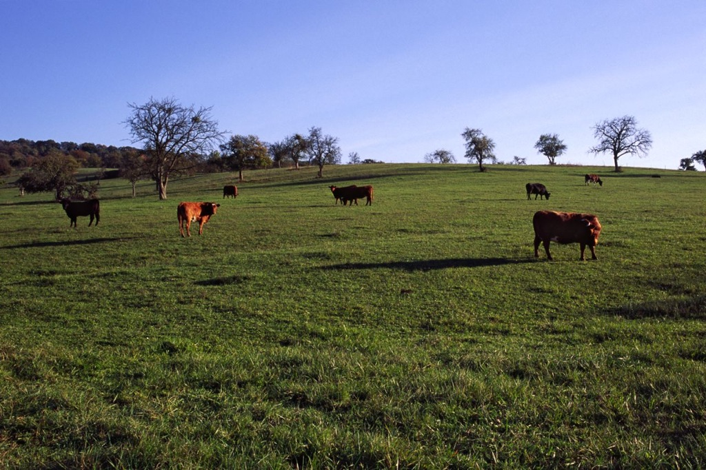 Weide im Bliesgau mit Rindern